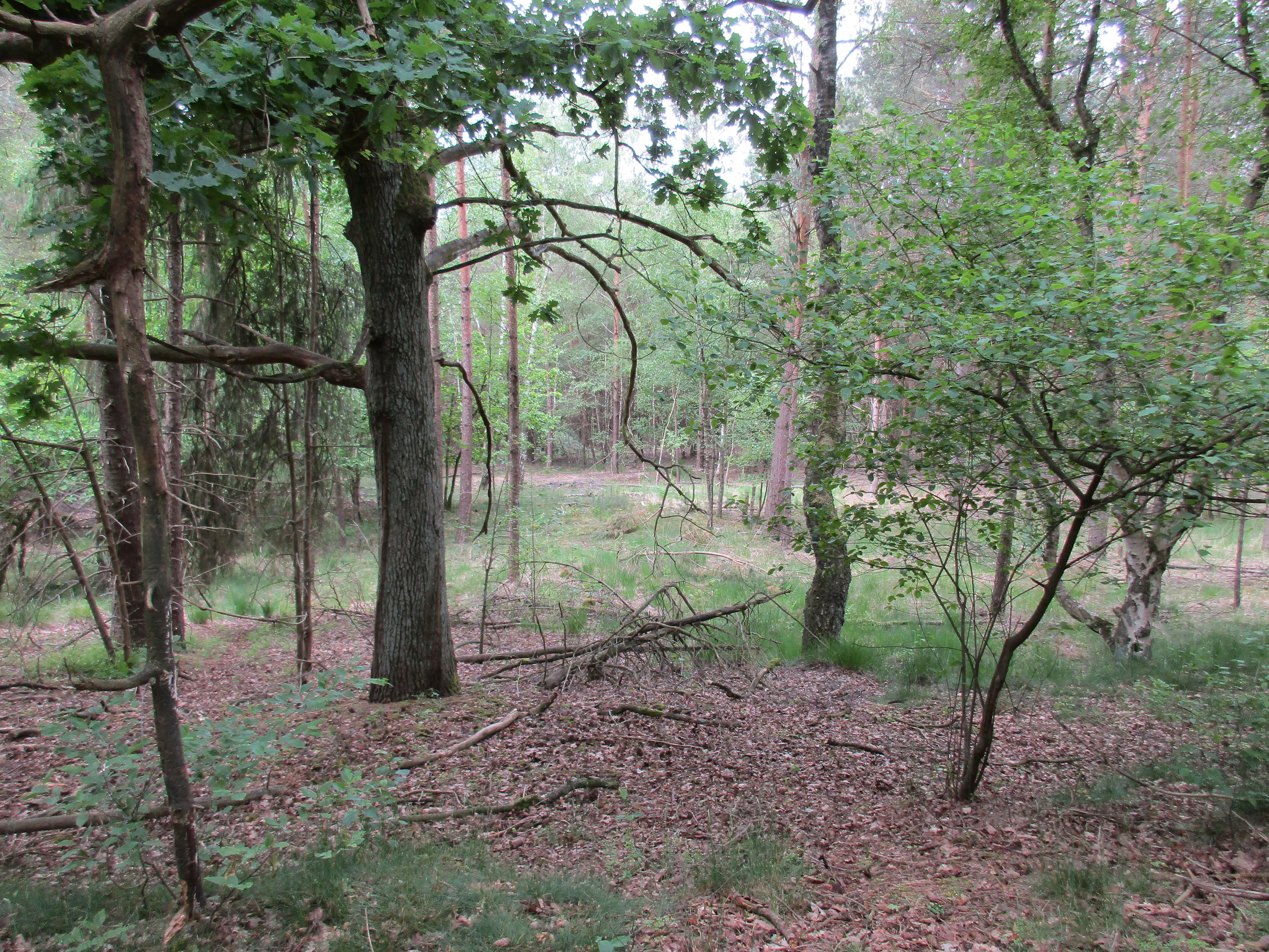 NSG Entenpool in Dickel, Landkreis Diepholz